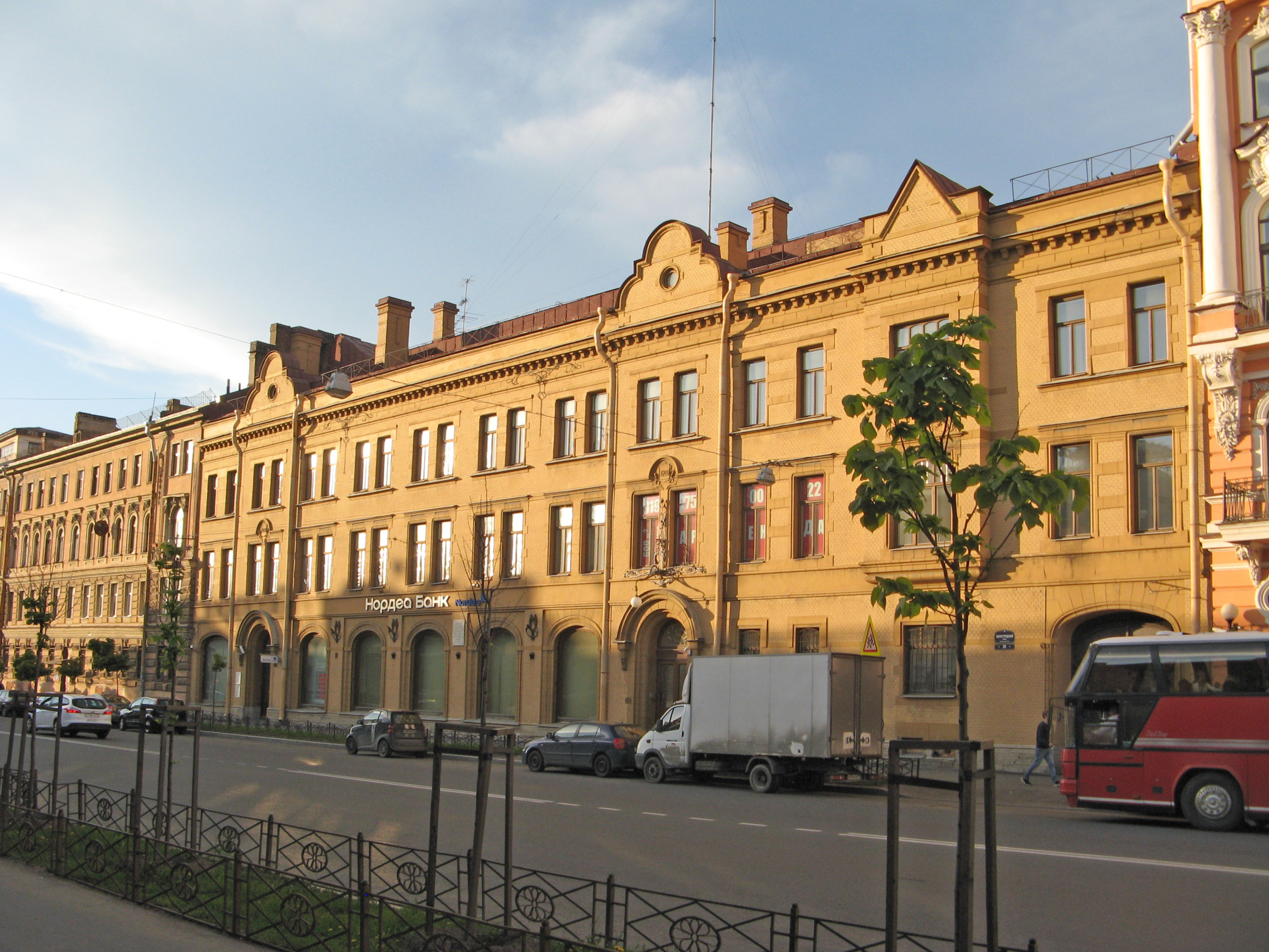 Дом, в котором был основан один из первых профессиональных союзов - Союз Рабочих Печатного дела: улица Звенигородская, 20, Центральный район, Санкт-Петербург